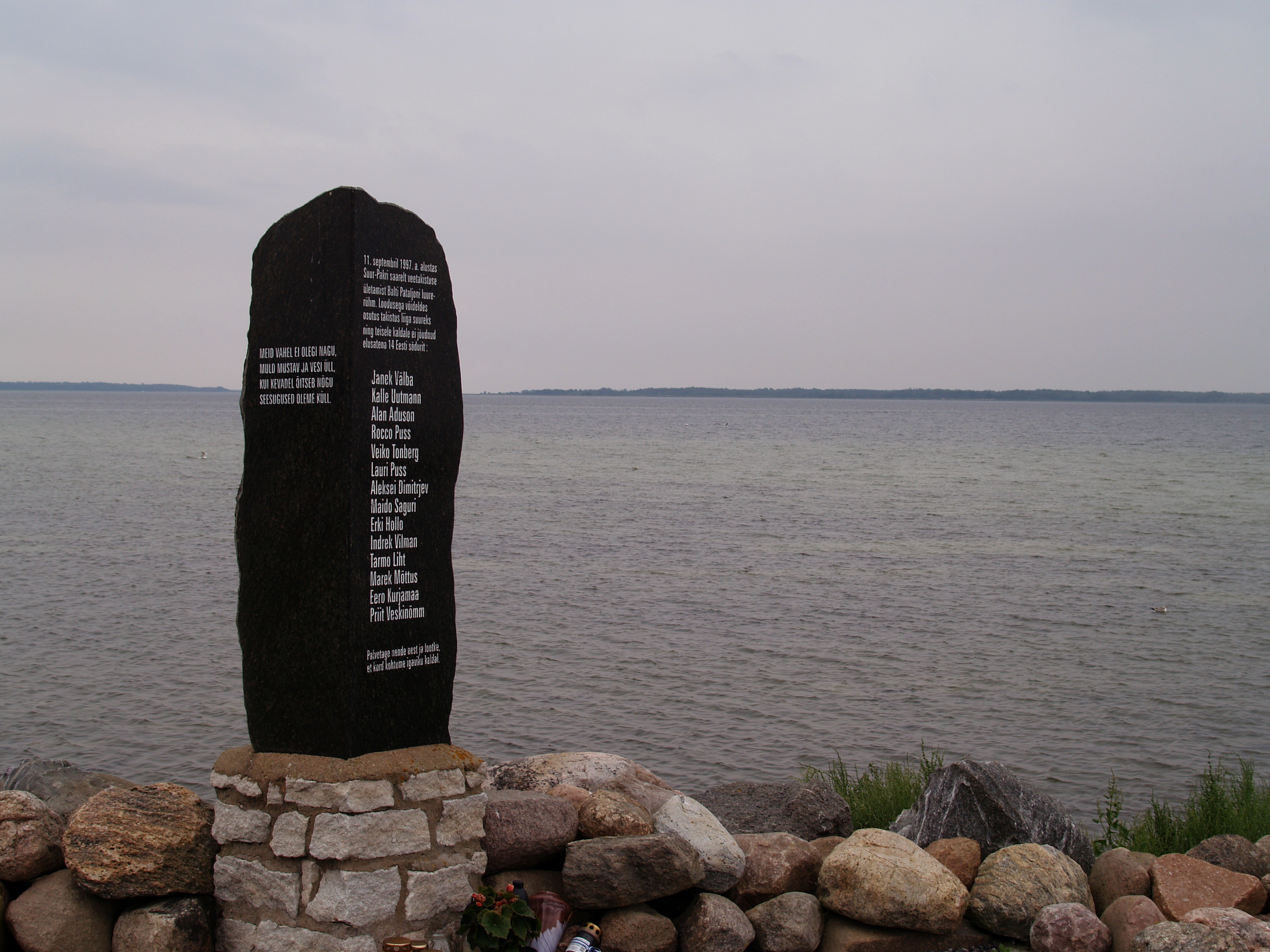 Mälestusmärk Kurkse suurõnnetuses hukkunud rahuvalvajatele. Kauguses on näha Pakri saari.